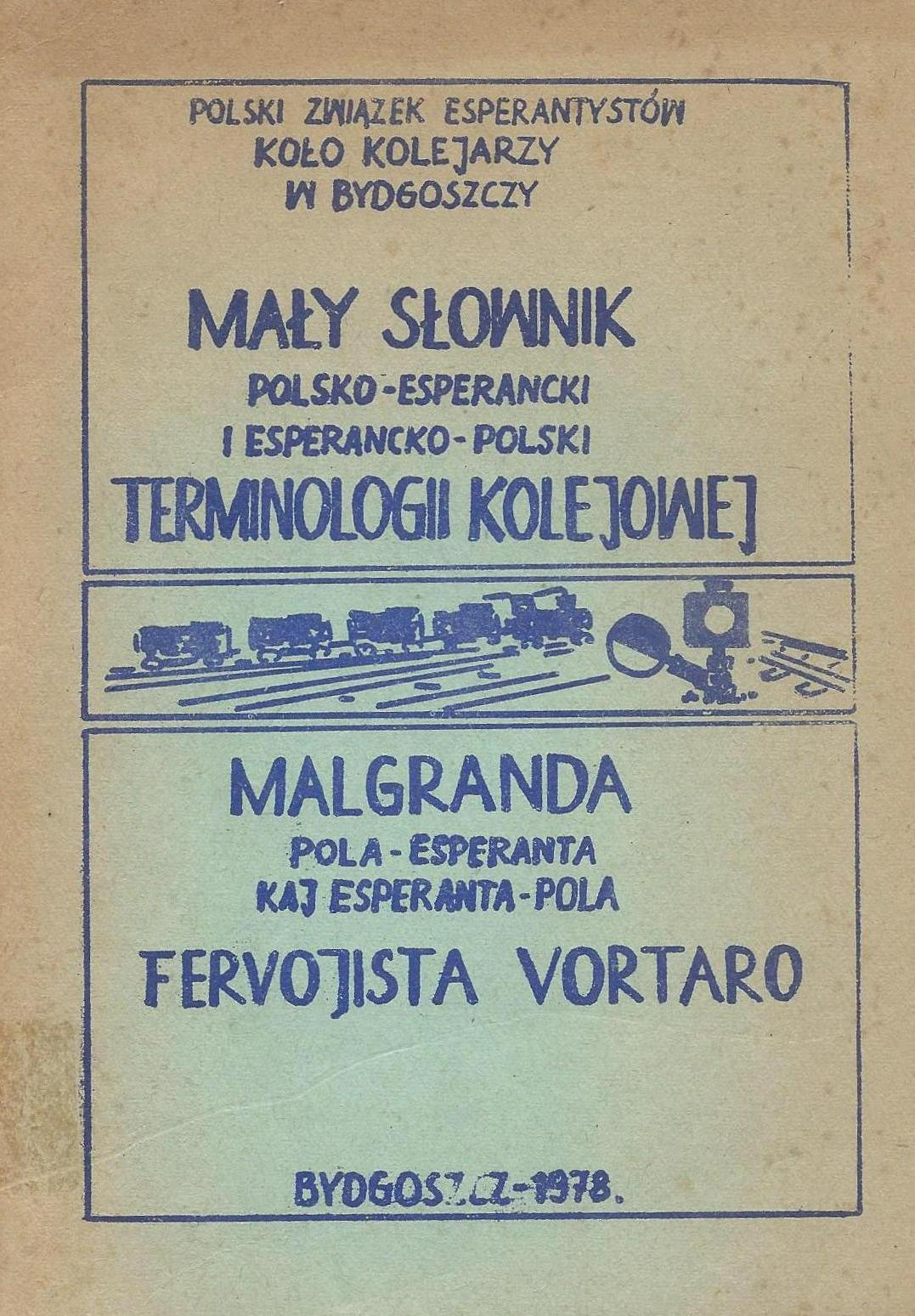 Librokovrilo de "Malgranda Fervojista Vortaro",1978